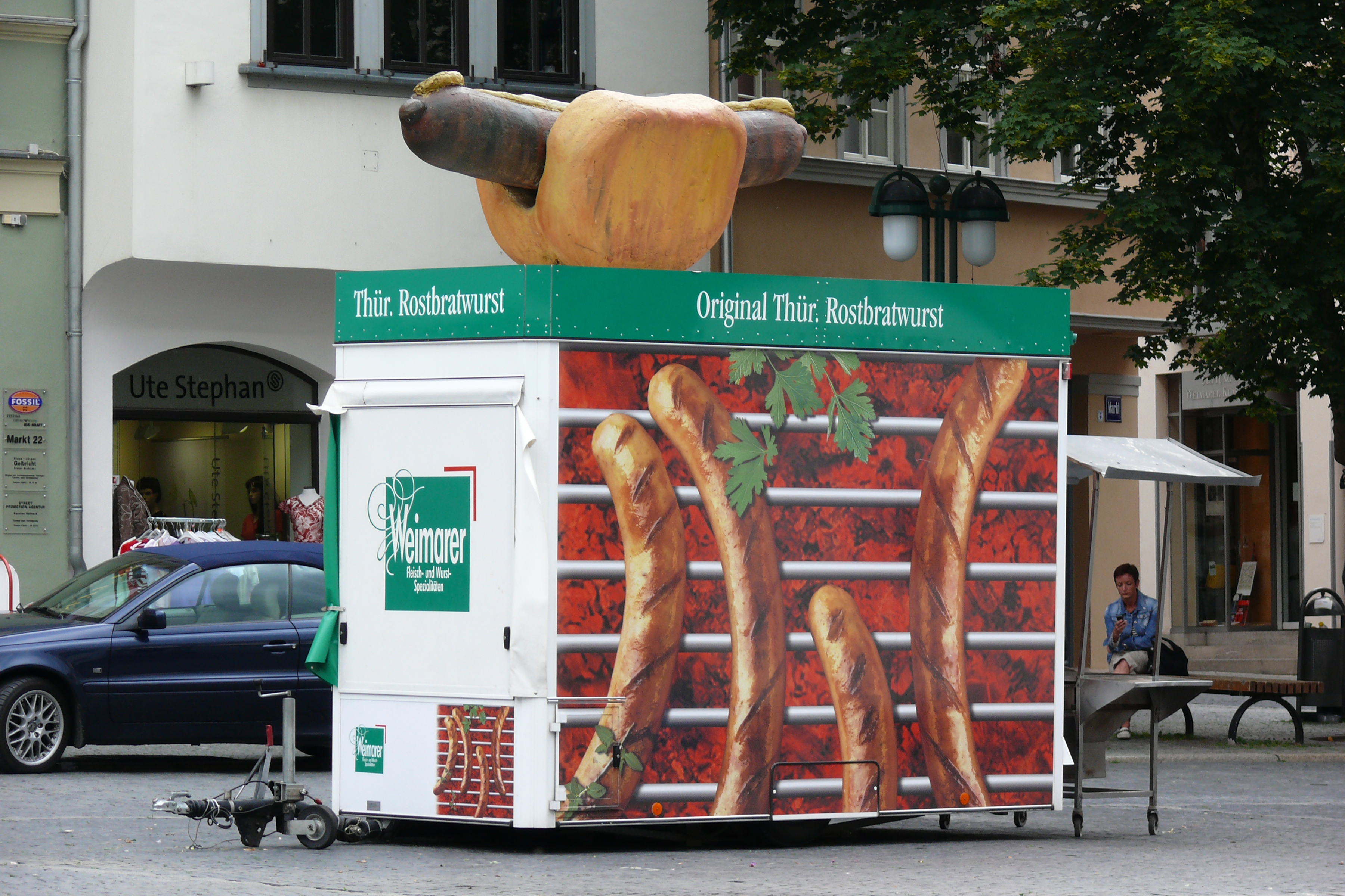 Wurstbude für Weimarer Rostbratwürste